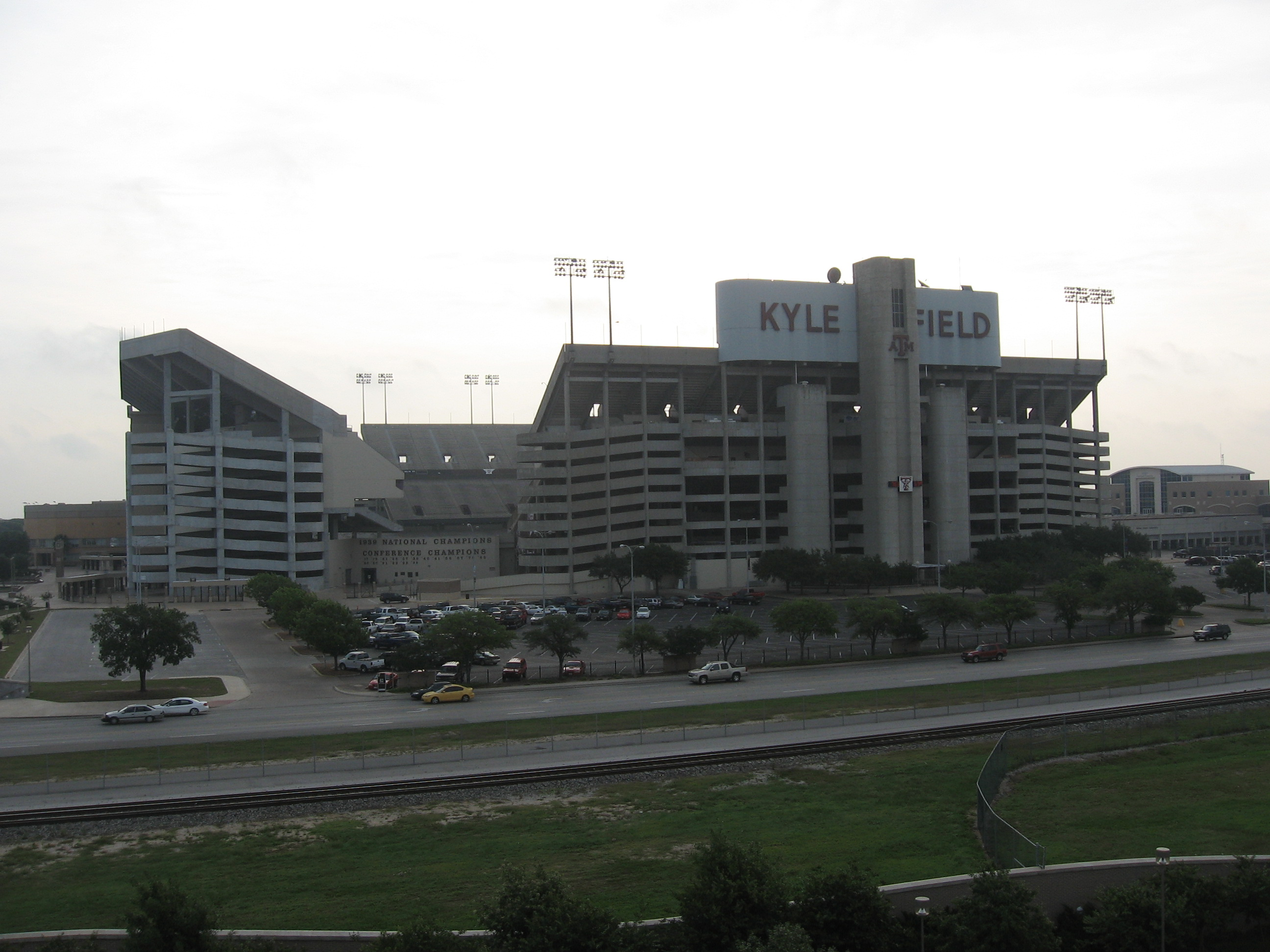 Kyle Field